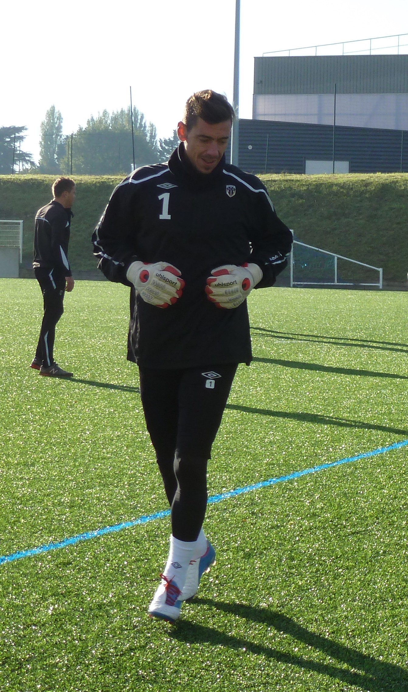 Malicki à l'entrainement en 2012